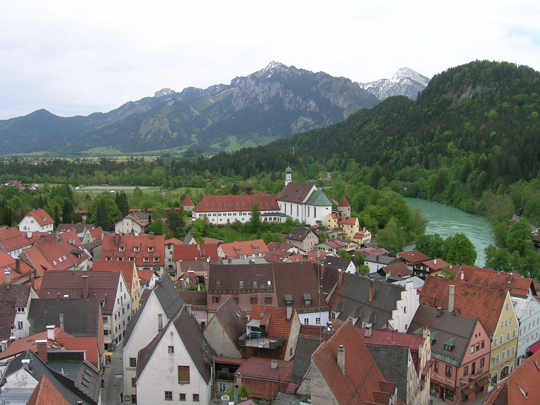 Blick vom Hohen Schloss auf das Franziskanerkloster Füssen